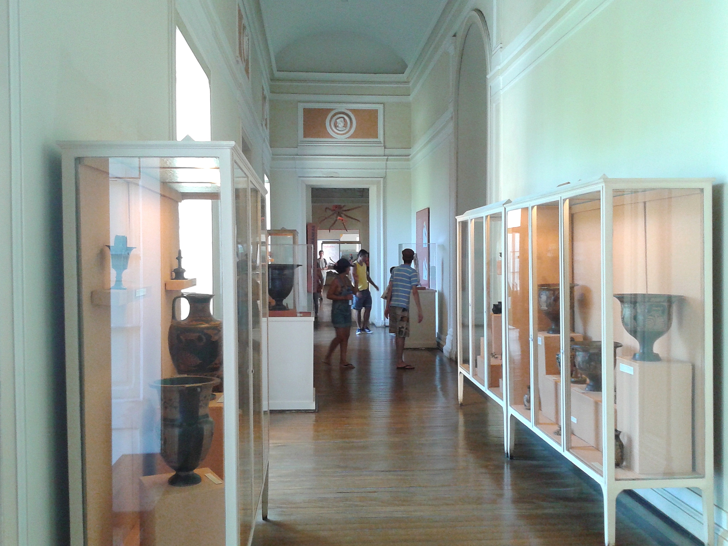 Cerâmicas do acervo greco-romano, Museu Nacional/UFRJ - Rio de Janeiro, RJ, Brasil.